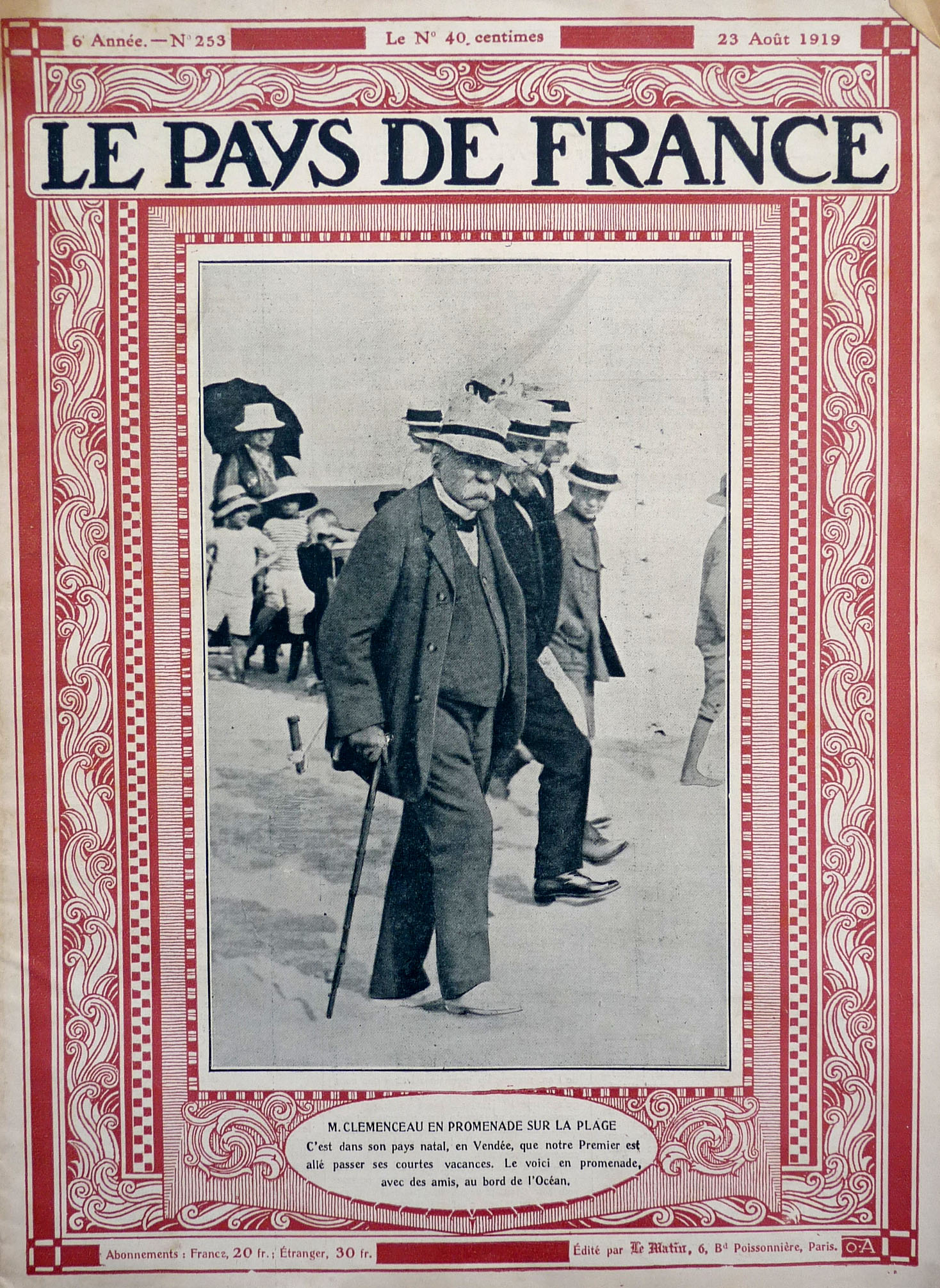 Couverture du périodique Le Pays de France, n° 253